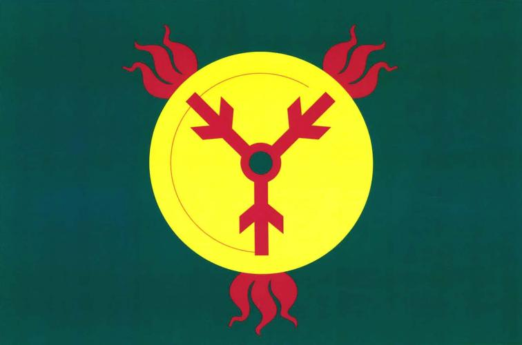 vlajka, Soběsuky, okres Kroměříž